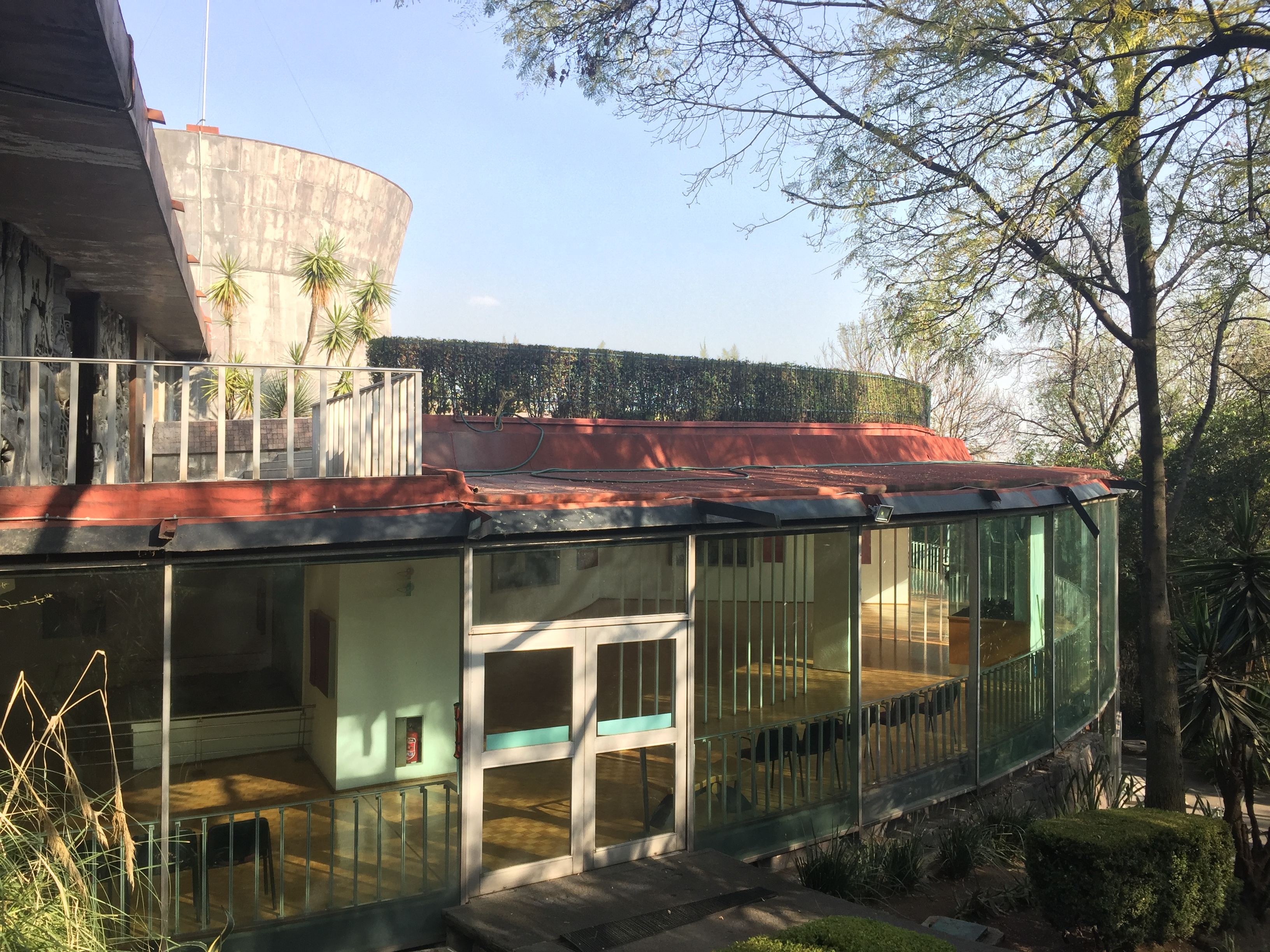 Vista exterior del Edificio, lado poniente.